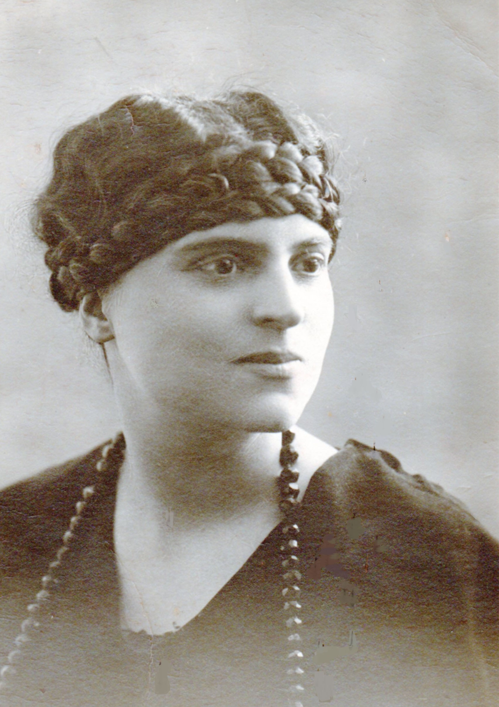 Claude Fayet écrivain vers 1925